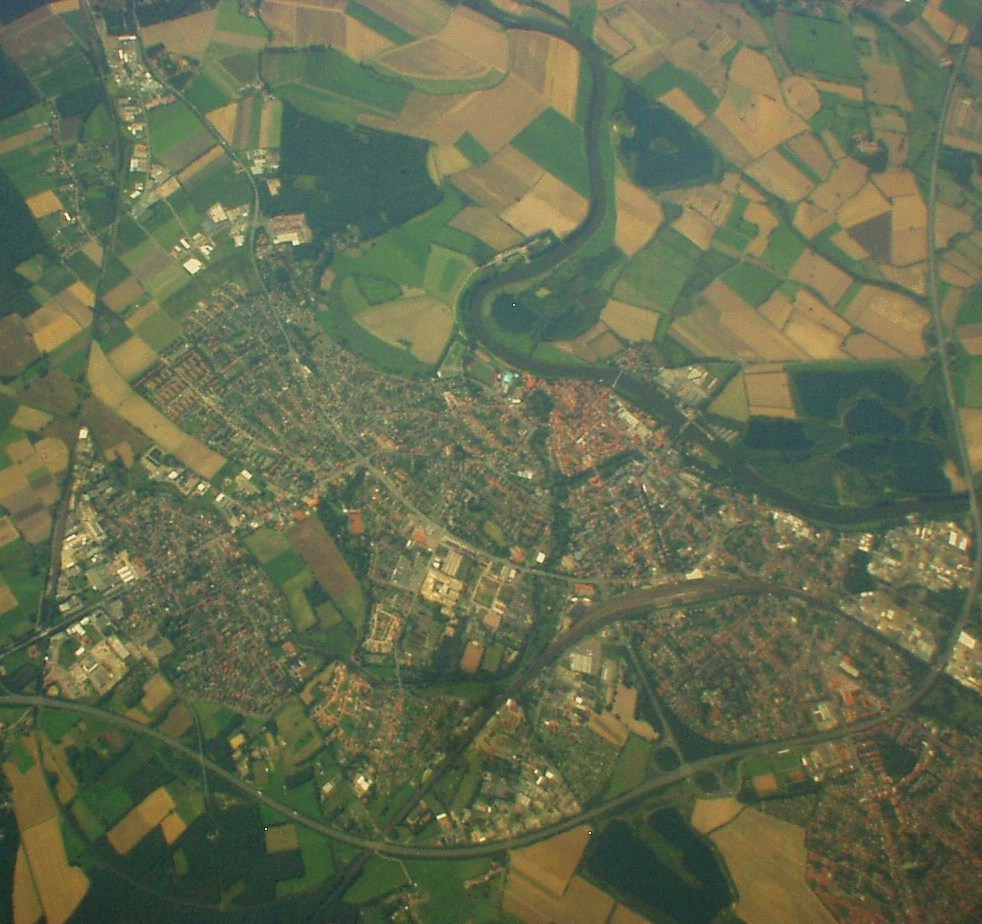 Nienburg